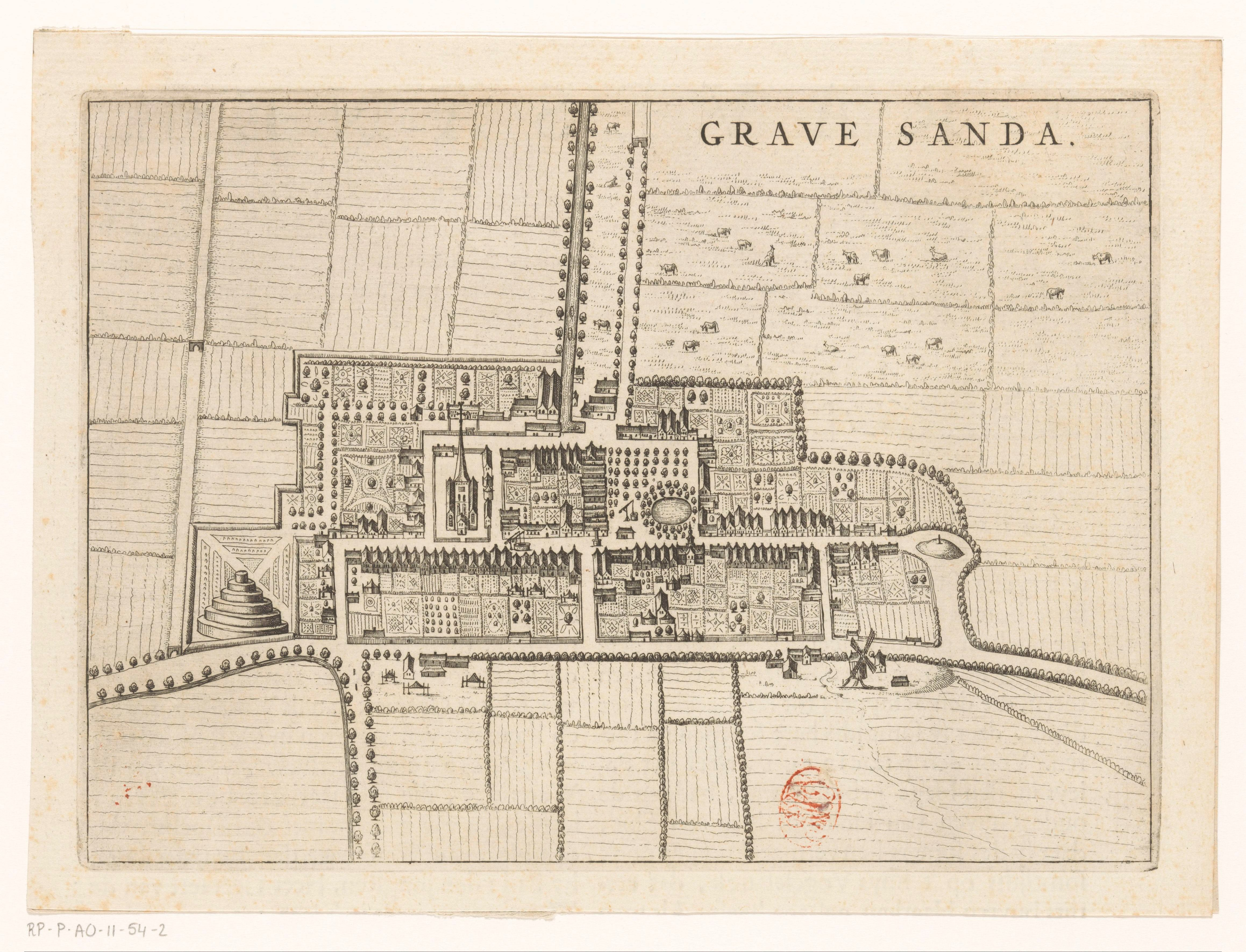 IdentificatieTitel(s): Plattegrond van ’s-GravenzandeGrave Sanda (titel op object)Objecttype: prent plattegrond Objectnummer: RP-P-AO-11-54-2Catalogusreferentie: KAN 1620Opschriften / Merken: verzamelaarsmerk, recto rechtsonder, gestempeld: Lugt 195Omschrijving: Plattegrond van 's-Gravenzande in vogelvluchtperspectief. Op verso Nederlandse tekst.VervaardigingVervaardiger: prentmaker: anoniemuitgever: Johannes Willemszoon BlaeuPlaats vervaardiging: AmsterdamDatering: 1652Fysieke kenmerken: ets en gravure; met tekst in boekdruk versoMateriaal: papier Techniek: etsen / graveren (drukprocedé) / boekdrukAfmetingen: plaatrand: h 163 mm × b 225 mmToelichtingPrent gebruikt in: Blaeu, Johannes Willemszoon. Toonneel der steden van de Vereenighde Nederlanden. 2 delen. Amsterdam: Johannes Willemszoon Blaeu, 1652, dl. 1.OnderwerpWat: maps of citiesWaar: 's-GravenzandeVerwerving en rechtenVerwerving: overdracht van beheer 1887Copyright: Publiek domein